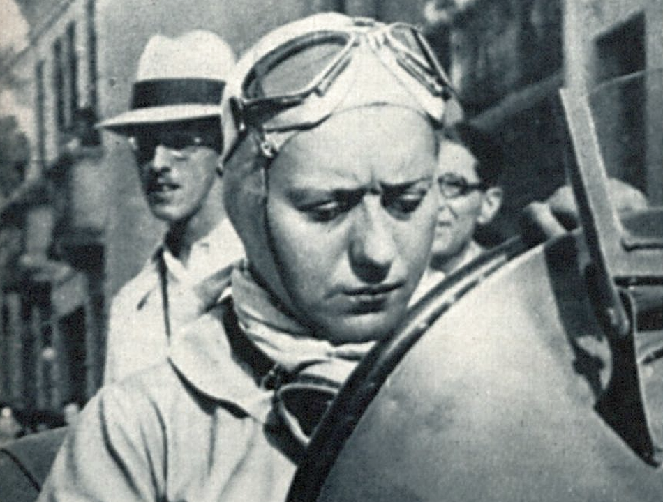 Hellé Nice antes da largada da prova do 1º Grande Prêmio Cidade de São Paulo, em 12 de julho de 1936, que após o acidente na linha de chegada com a corredora francesa passou à história como a "corrida da morte" (6 espectadores morreram, e mais de trinta ficaram feridos)